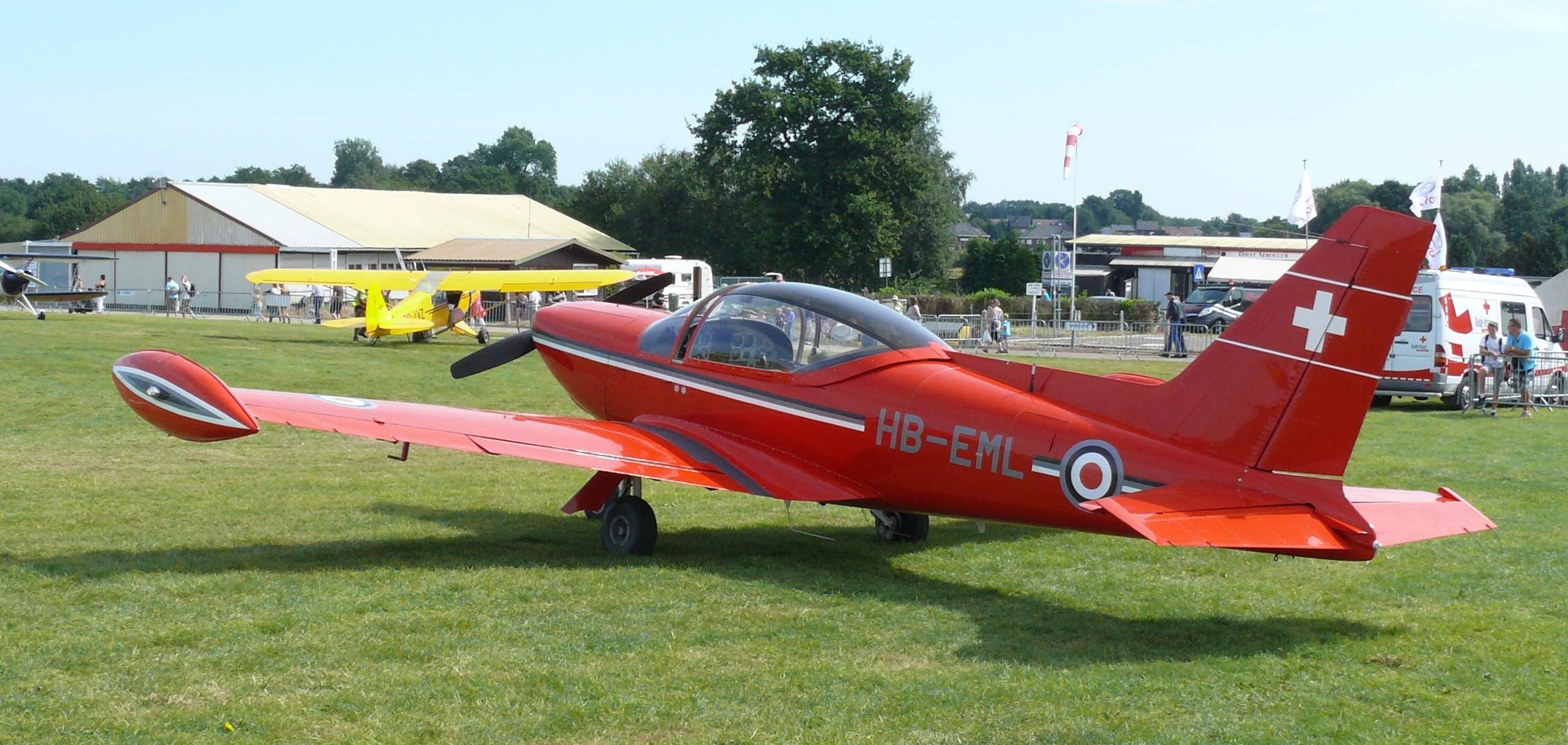 Aviamilano F-260 HB-EML (cn 502) op de Schaffen Fly and Drive In 2012.